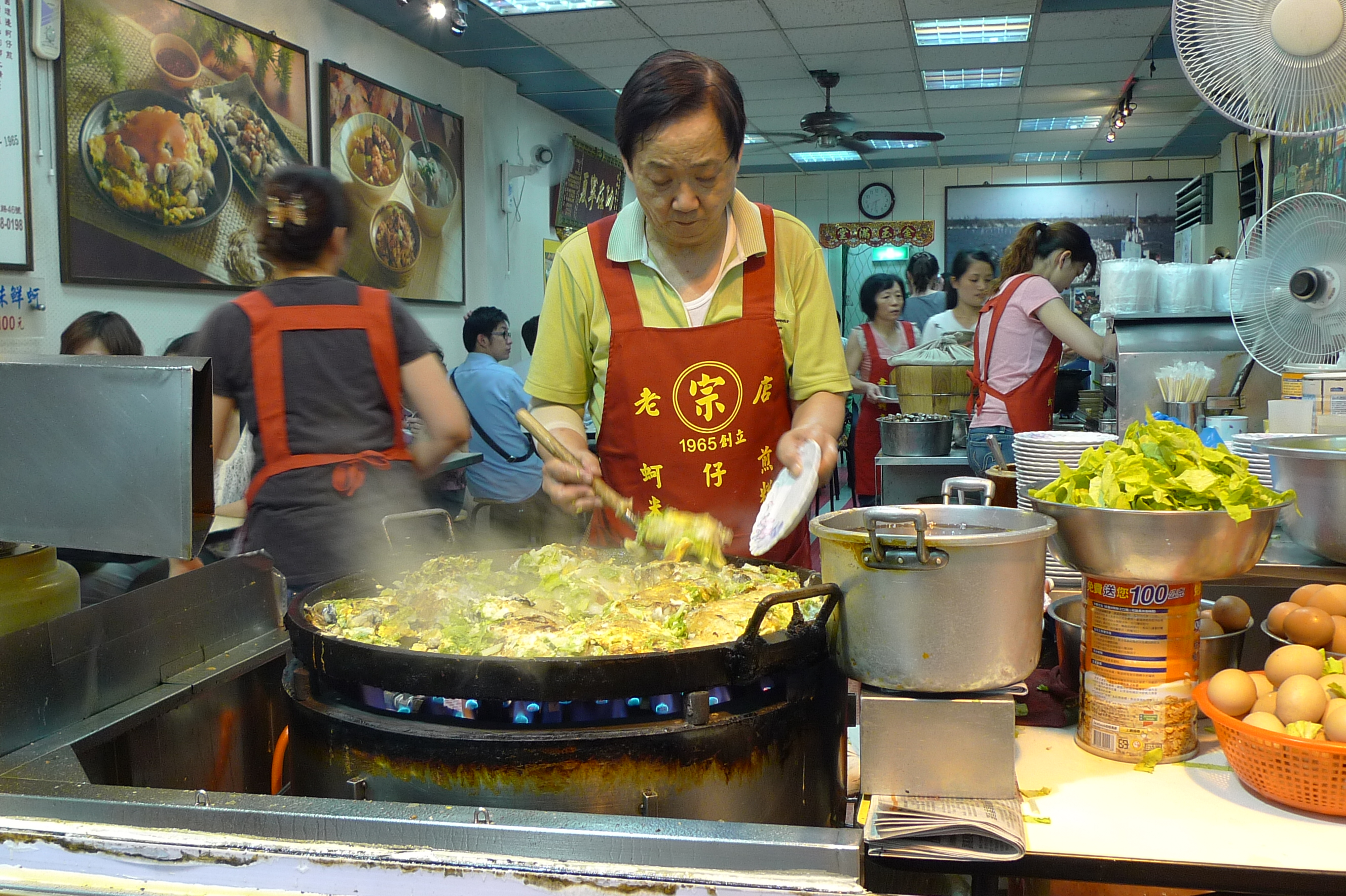 大煎鍋上滿滿的蚵仔煎